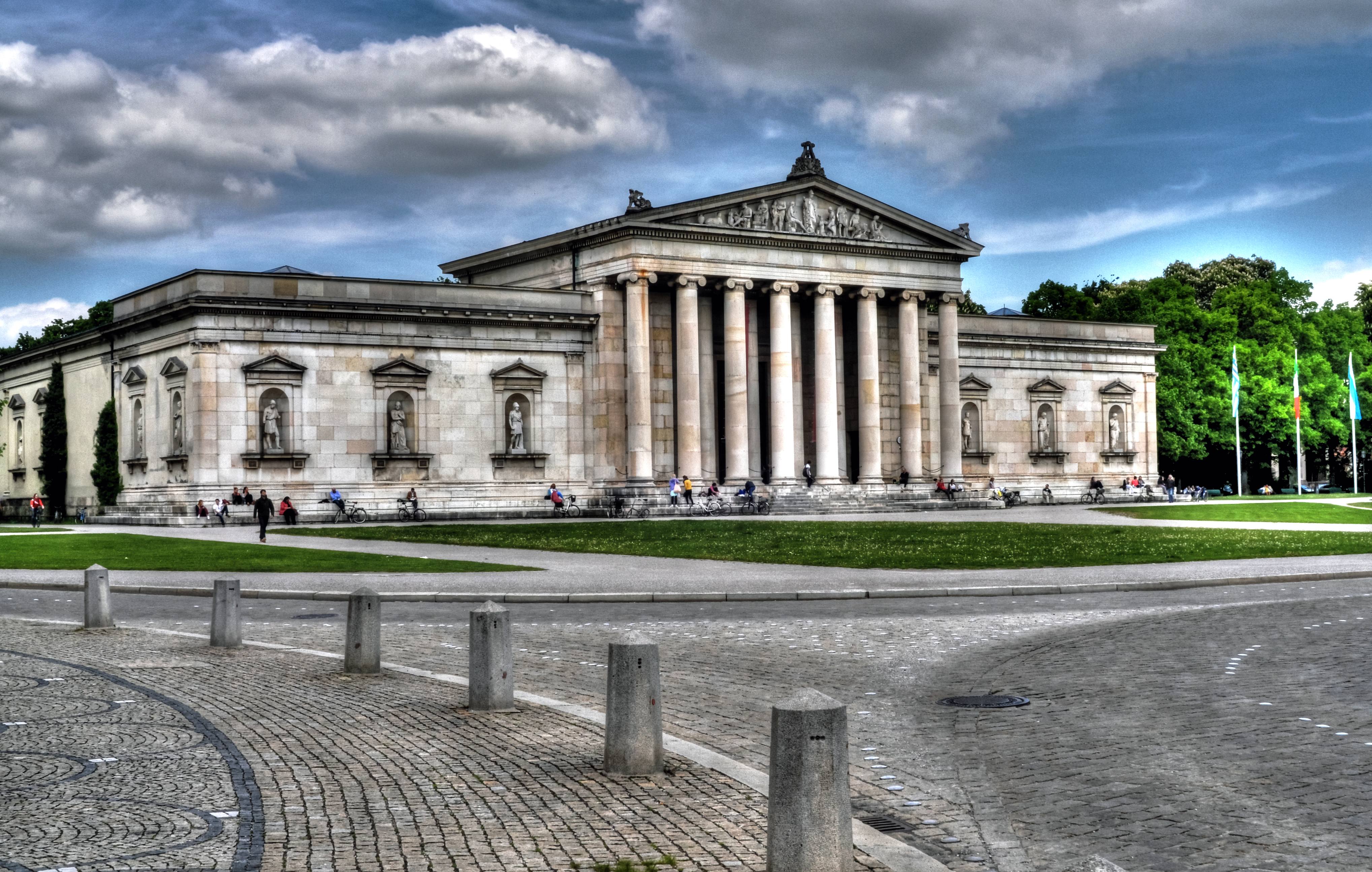 Sammlung antiker griechischer und römischer Skulpturen. Der Bau wurde von Leo von Klenze im Auftrag des Kronprinzen Ludwig (später König Ludwig I) zwischen 1816 und 1830 geschaffen. Collection of ancient Greek and Roman sculptures. The building was designed by Leo von Klenze on behalf of Crown Prince Ludwig (later King Ludwig I), 1816-1830.